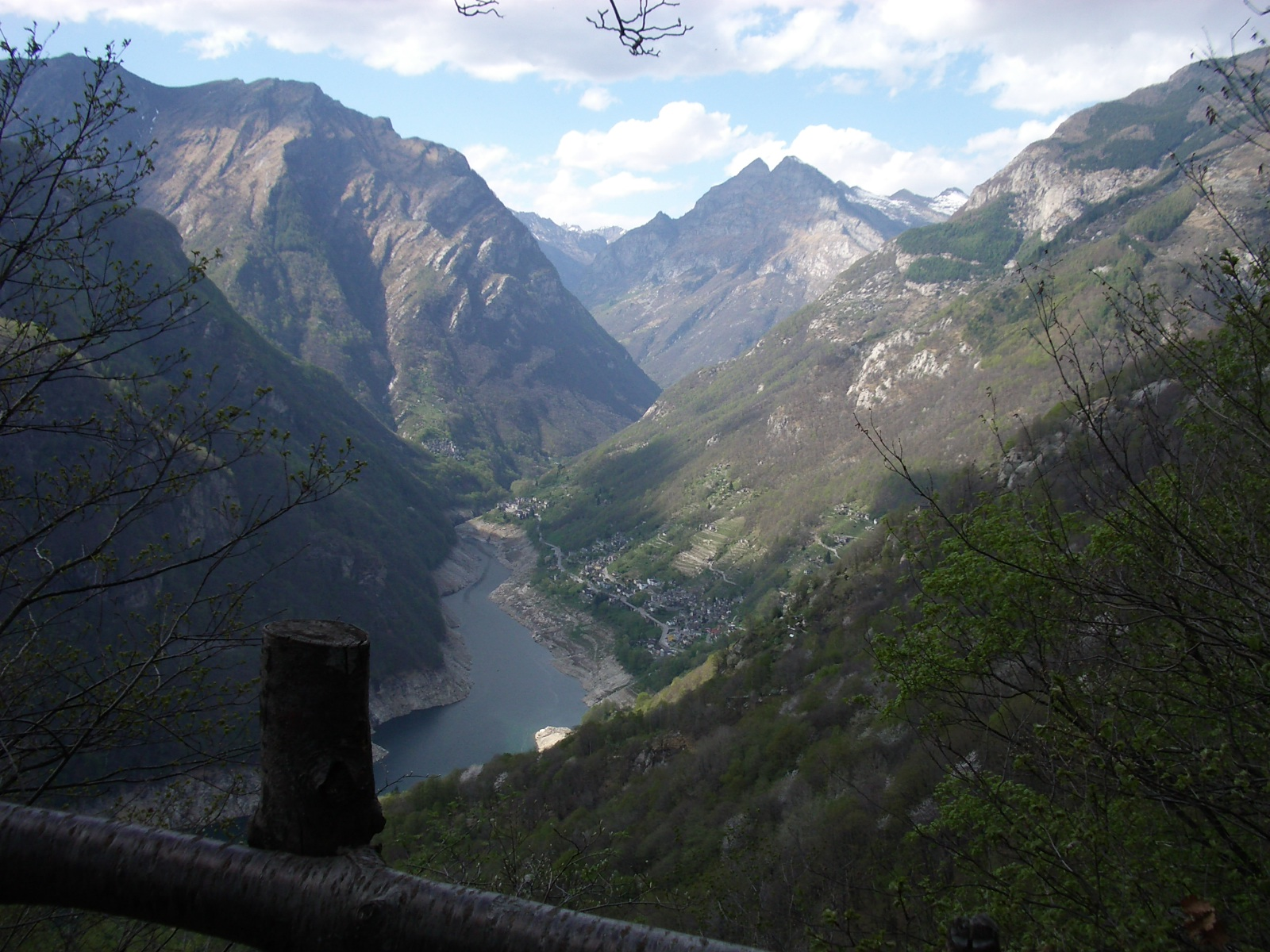 Valle Verzasca, Switzerland. Lago di Vogorno. self-made, May 2006